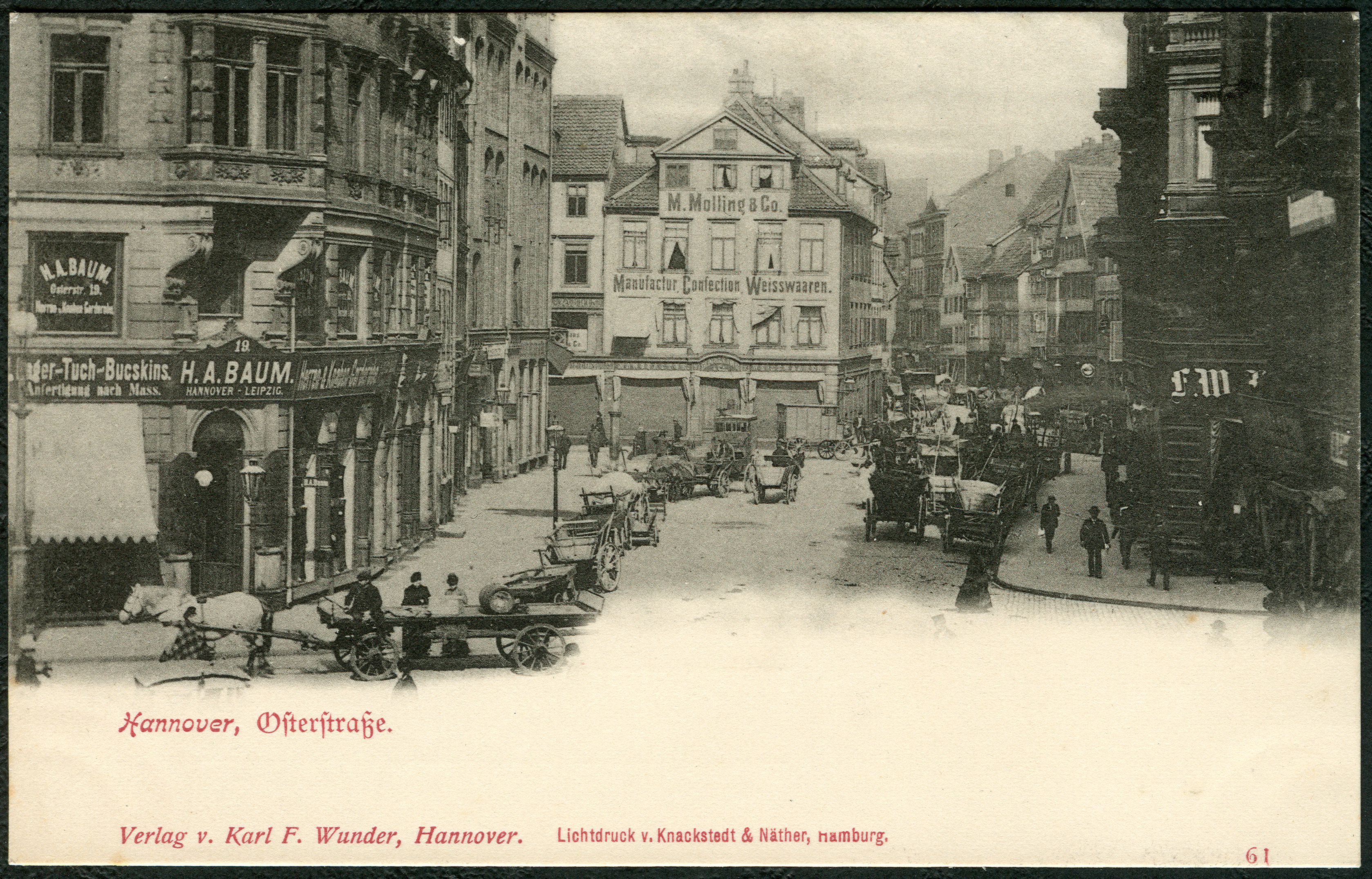 Ansichtskarte mit der fortlaufenden Nummer 61 von Karl F. Wunder mit einem Blick durch die Osterstraße, gesehen von der (damaligen) Grupenstraße (im Vordergrund links) in der Verlängerung der seinerzeit neu bebauten Karmarschstraße. Im Eckgebäude vorne links bietet der H. A. Baum, der auch in Leipzig ein Geschäft betrieb, seine "Herren- und Knaben-Garderobe" an, die er mit Stoffen und "Tuch-Bucskins" aus seinem Lager "nach Mass" anfertigte. Etwa in der Bildmitte der mit Menschen und zahlreichen Pferdefuhrwerken belebten Szene ist der Altbau der Firma Max Molling & Co. an der Ecke zur Seilwinderstraße , wo nach rechts die Große Packhofstraße abzweigt. Zur Anfertigung dieser Postkarte, im Lichtdruck-Verfahren durch die Hamburger Firma Knackstedt & Näther, wurde vermutlich eine ältere Aufnahme des hannoverschen Fotografen vor 1898 herangezogen und der Vordergrund in nahezu weiß überblendet, damit die Absender der Ansichtskarten hier auf der Bildseite ihre selbst geschrieben Nachrichten aufschreiben konnten (denn bis etwa 1905 durften auf den umseitigen Adressseiten tatsächlich lediglich die Adressen der jeweiligen Empfänger notiert werden). Dieses Dokument wurde freundlicherweise von Heralde Schmitt-Ulms zur Verfugung gestellt, um es als Digitalisat bei Commons nachhaltig allen Menschen zu Bildungszwecken zukommen zu lassen ...